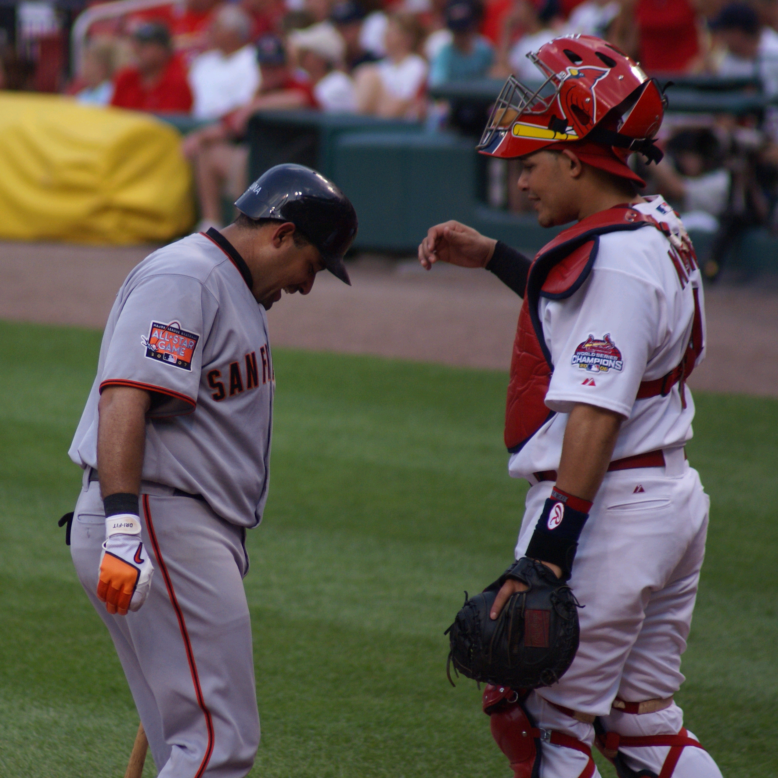 Bengie Molina (left) and Yadier Molina